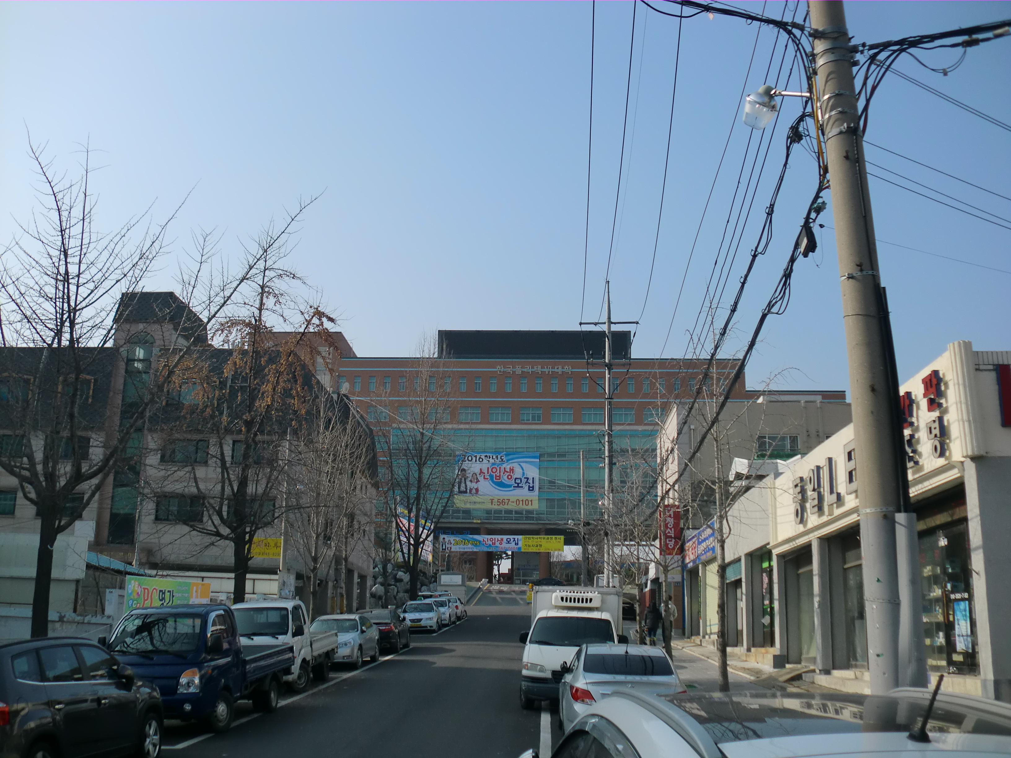 한국폴리텍6대학 대구캠퍼스